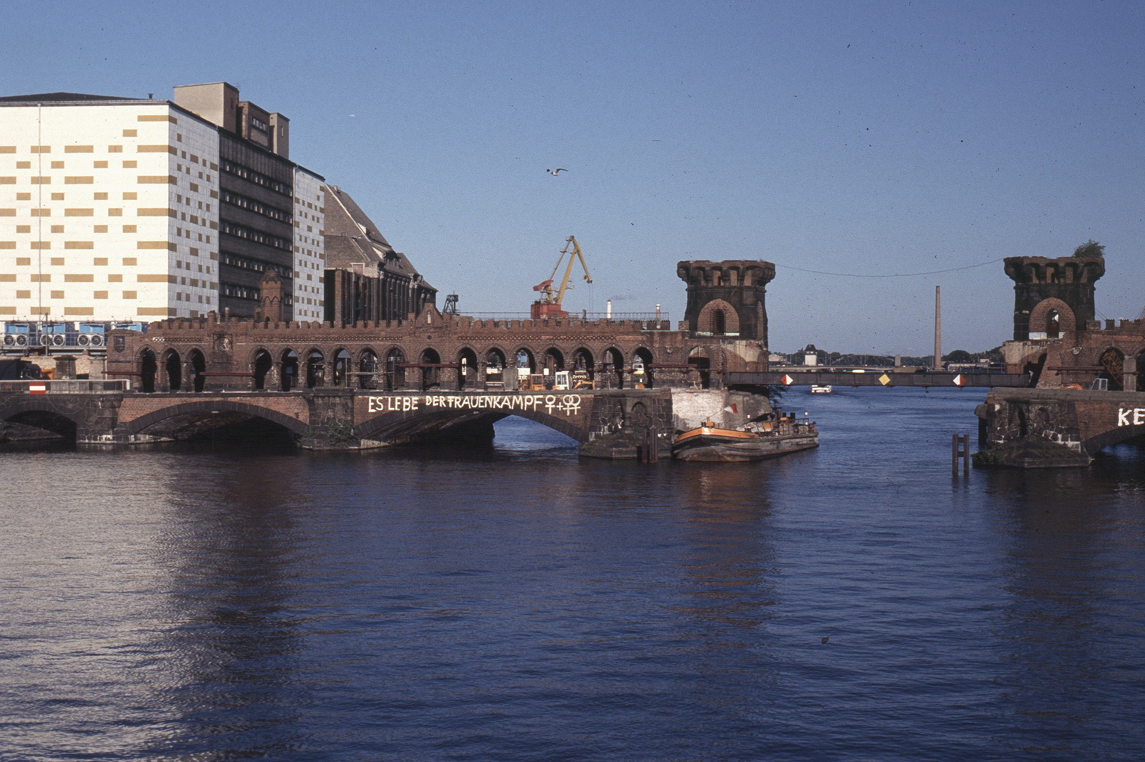 Oberbaumbrücke 1993, Scan von Dia